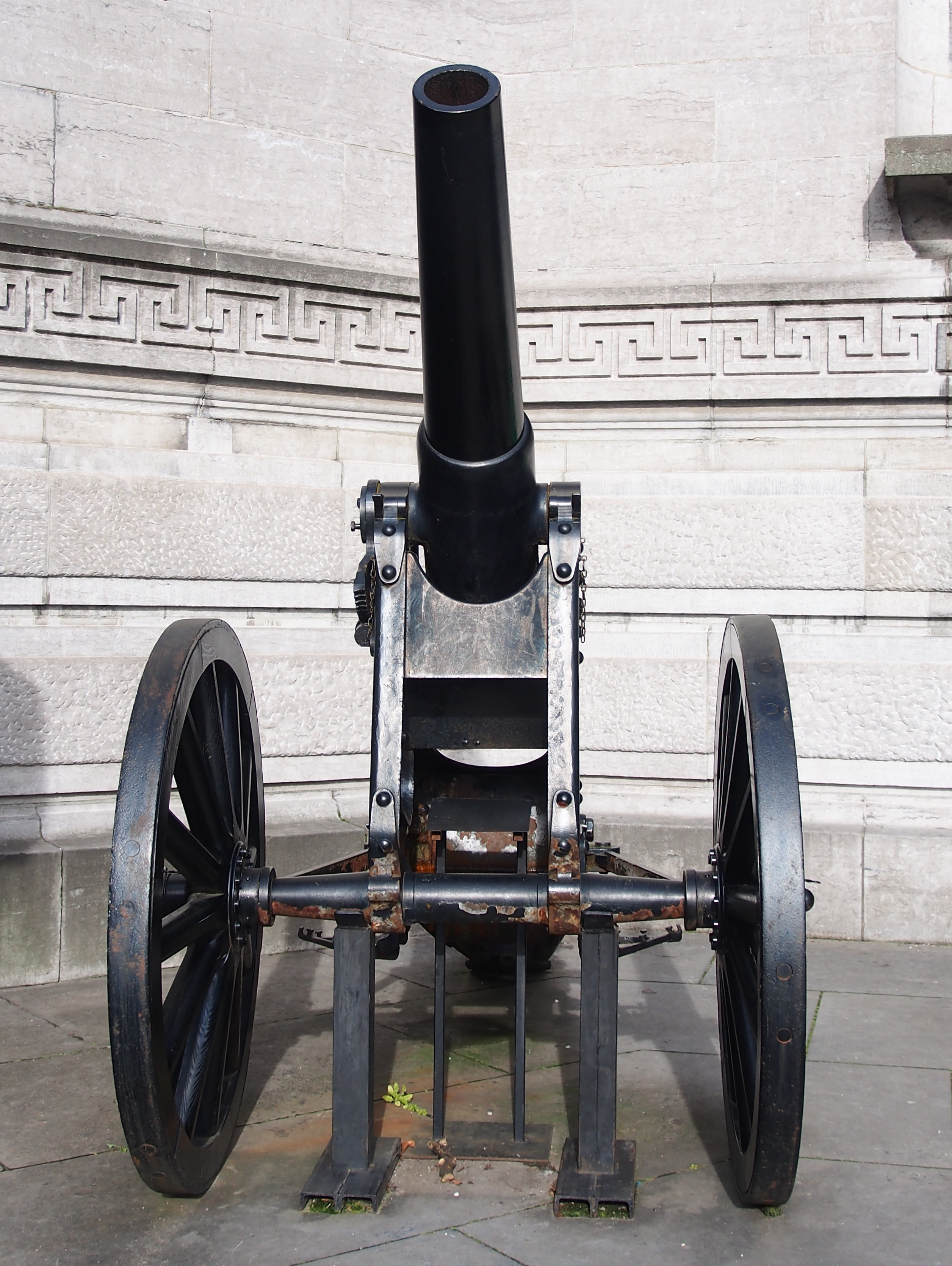 Artillery at the Musée Royal de l'Armée